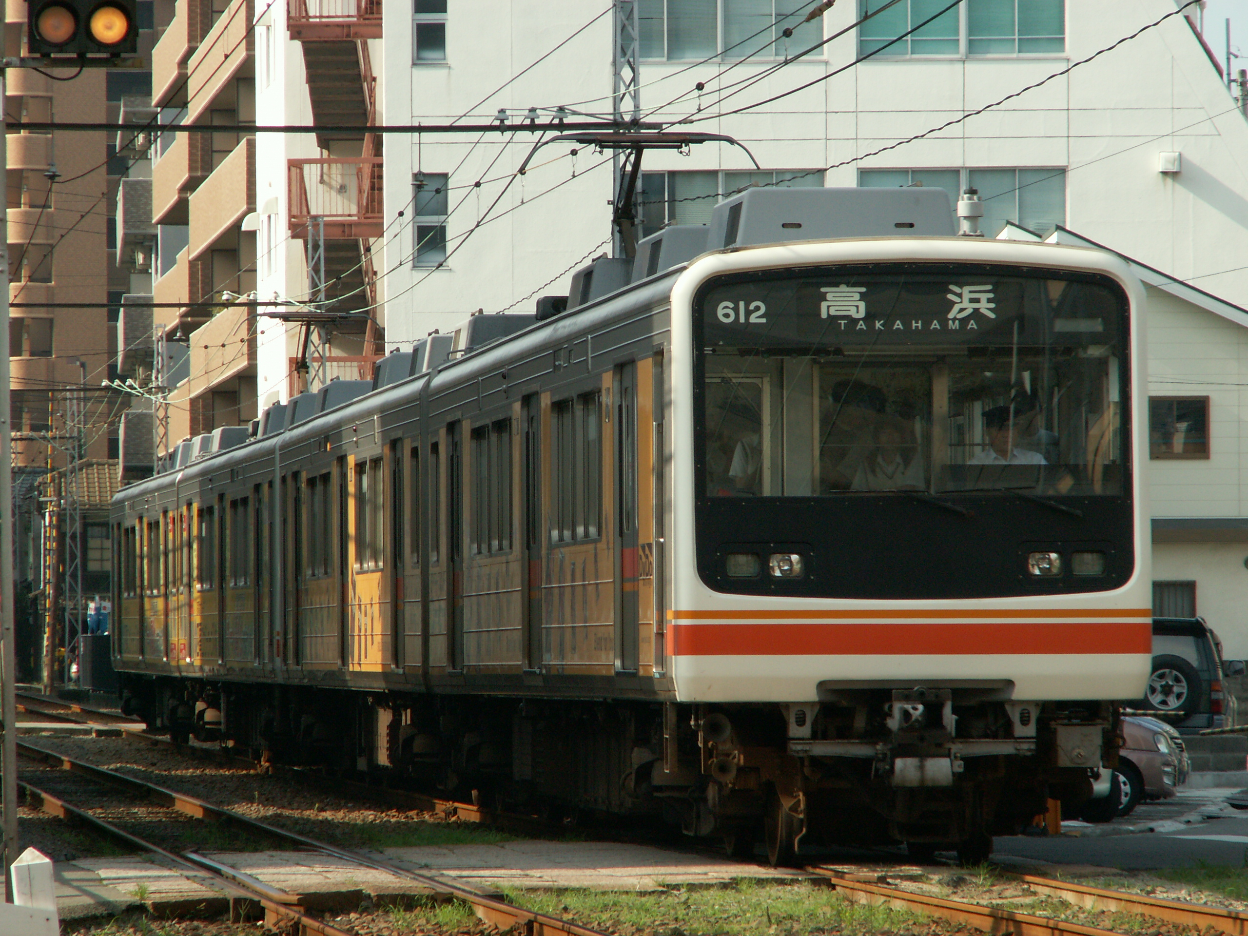 伊予鉄道610系